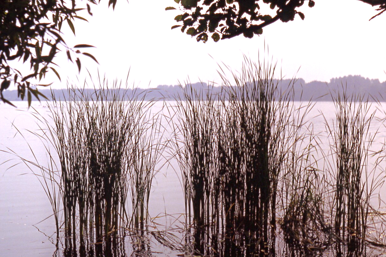 Abendstimmung am „Hinsbecker Bruch“; mit gut 37 ha Wasserfläche der größte der vier Krickenbecker Seen am Niederrhein. Am Ufer etwas Röhricht aus Schmalblättrigem Rohrkolben (Typha angustifolia), Erlen- und Weidengehölze.